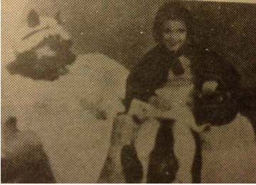 Caperucita Roja (cortometraje)